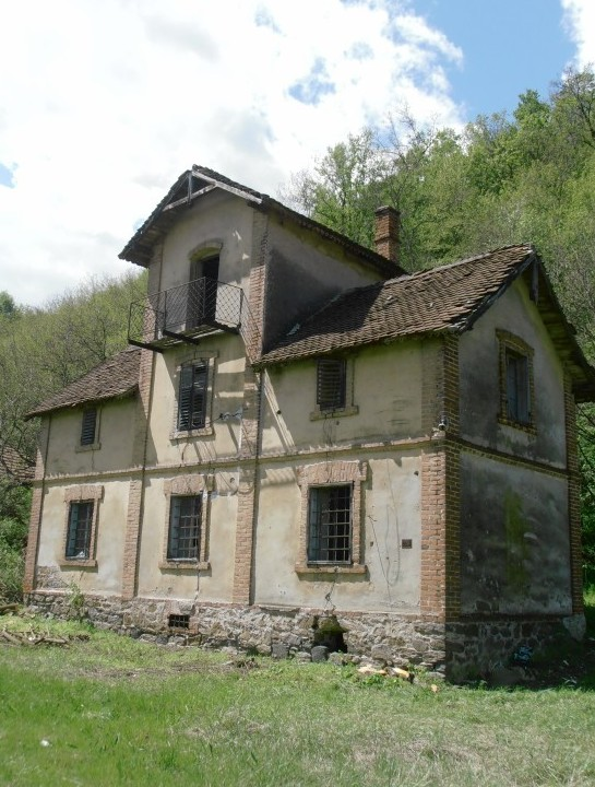 Vila - letnjikovac generala Vukomana Aračića i njegove porodice u selu Novo Lanište kod Jagodine. Snimak iz aprila 2012. godine.